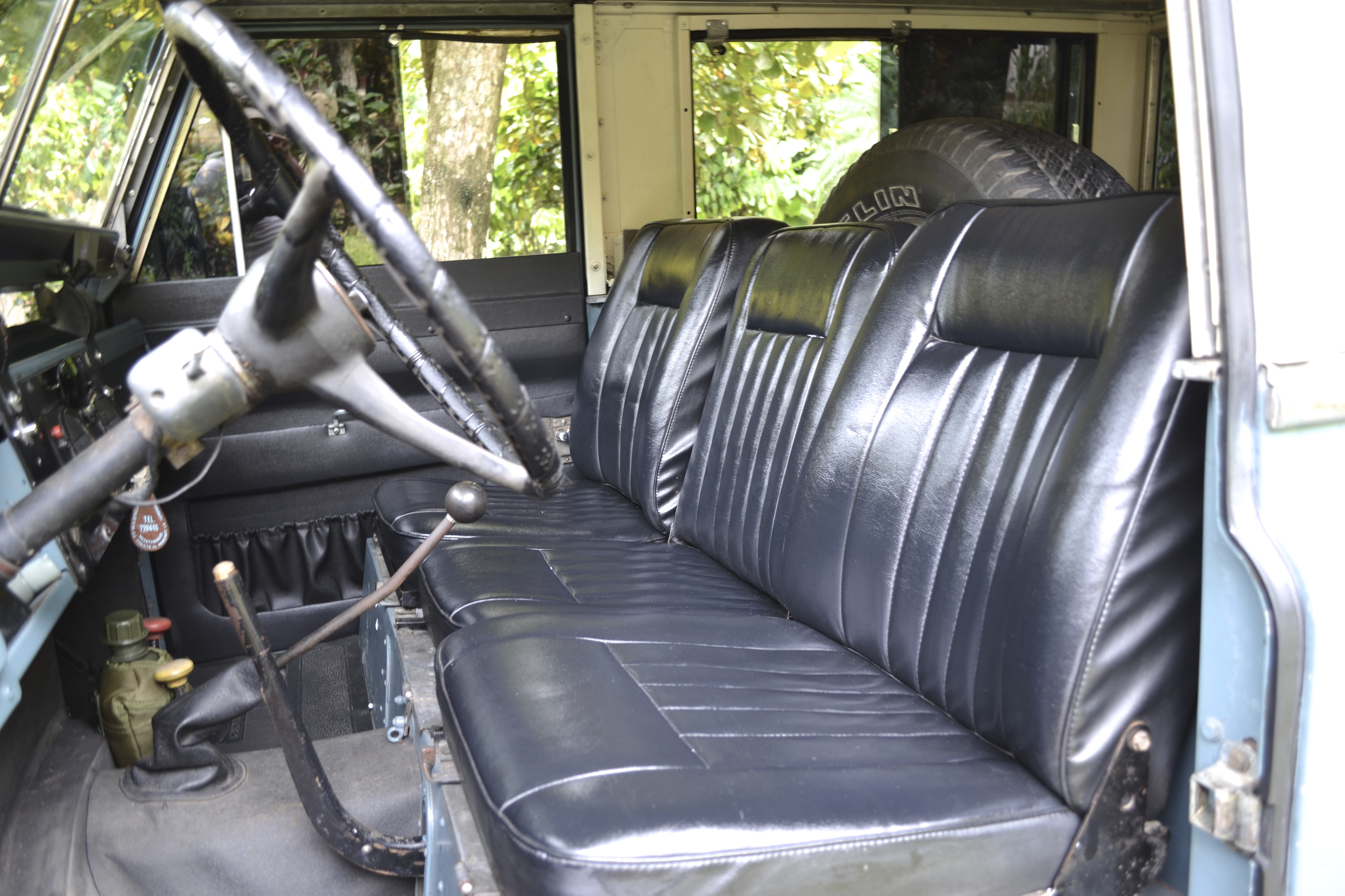 Land Rover Serie IIA '88 1970 - Sillones